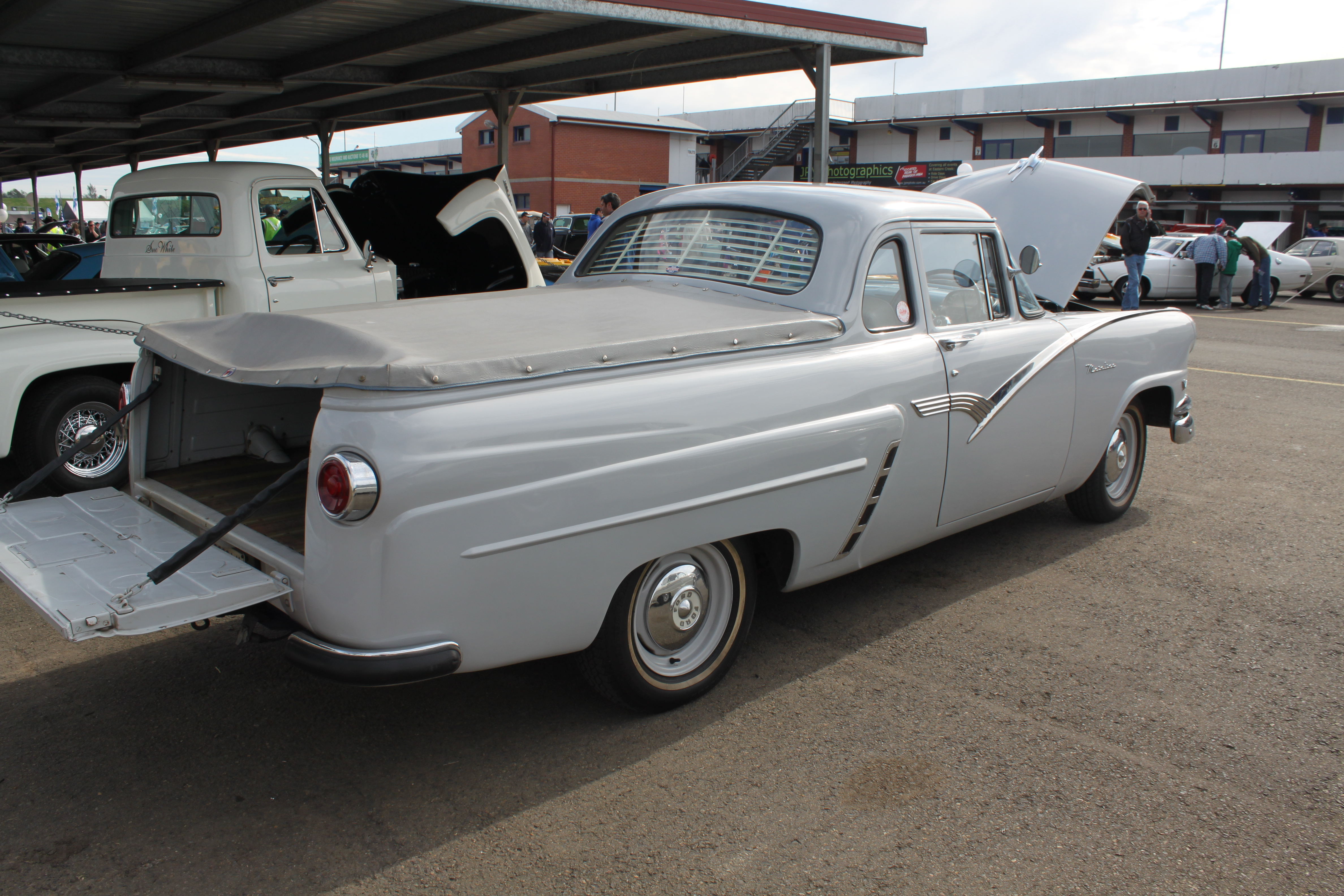 1957 Ford Mainline Ute